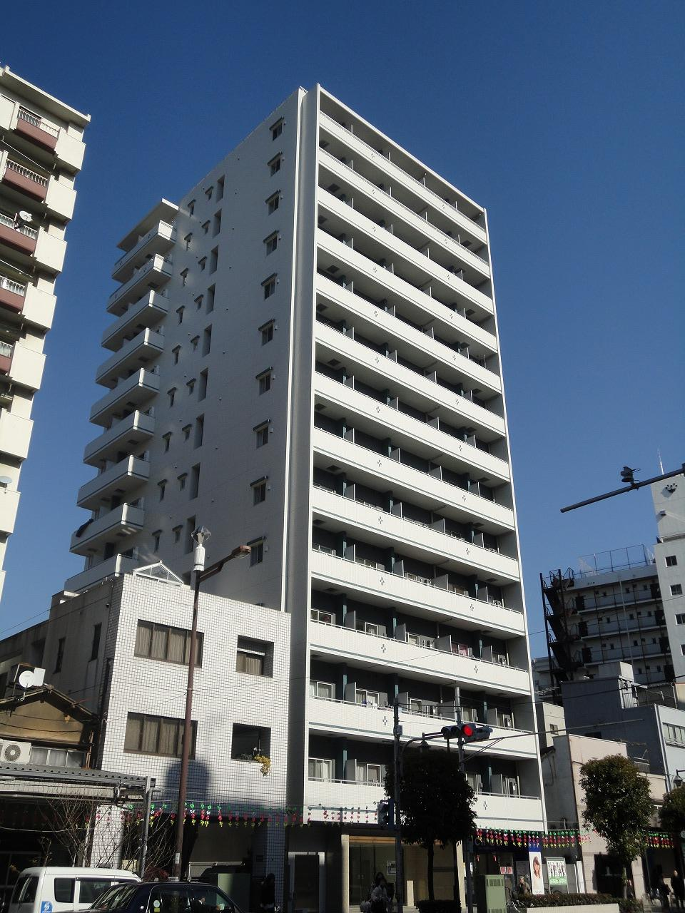 門前仲町レジデンス参番館の写真